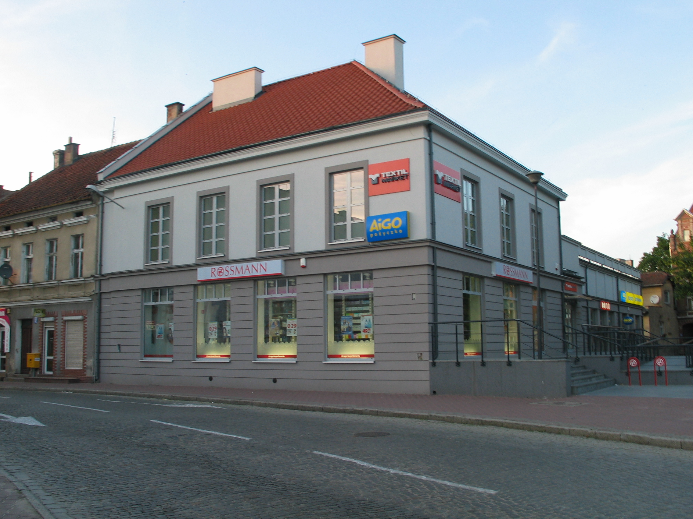 Mrągowo, ul. Warszawska 37 - sklep sieci Rossmanna